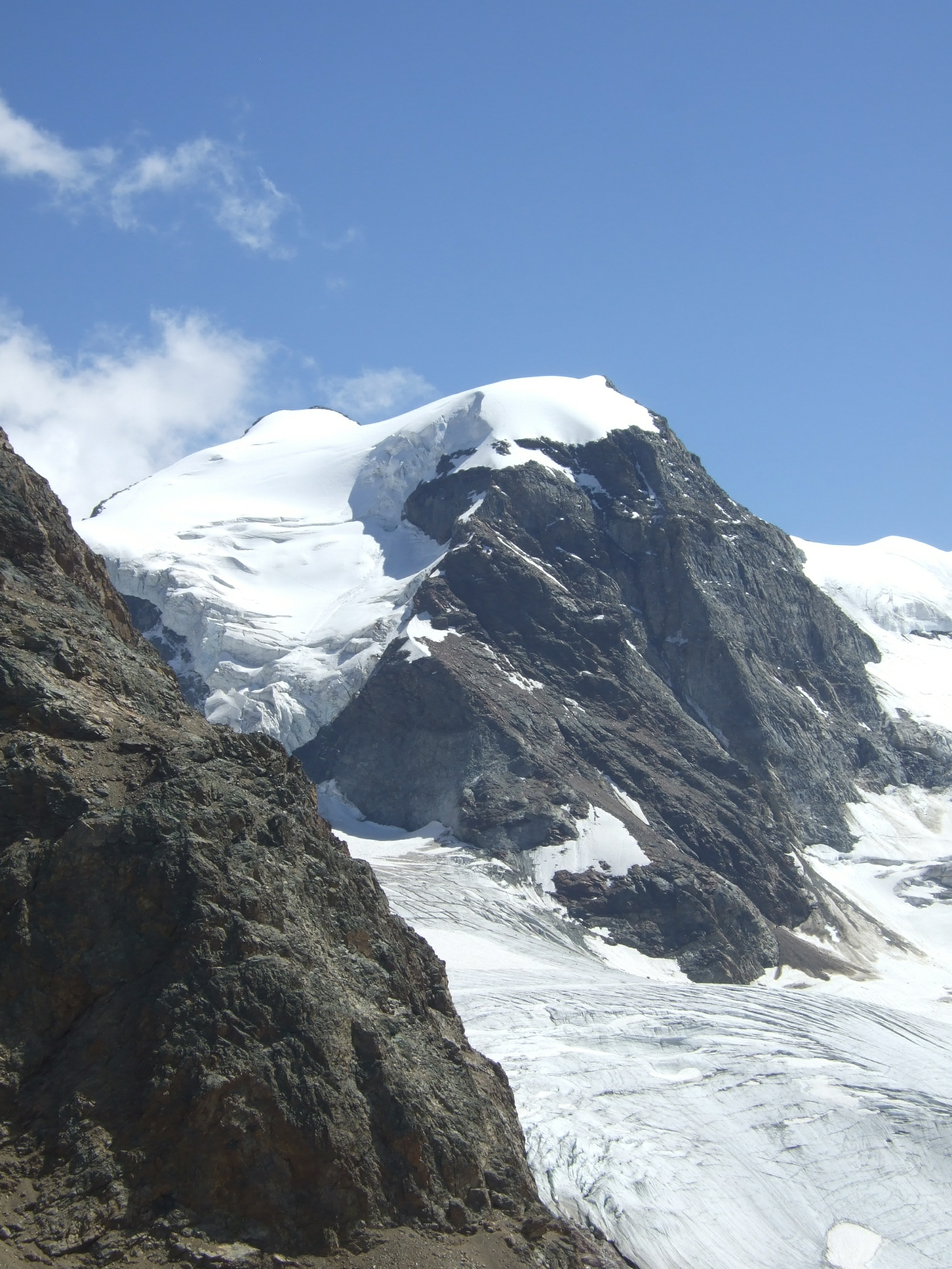 Piz Cambrena von der Diavolezza aus gesehen, August 2008, Schweiz